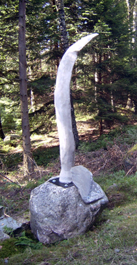 Minnessten över bombplanets som störtade i Svensköp 1944-08-30, Lancaster Mk.III HK594 AA-G, No. 75 Squadron RAF